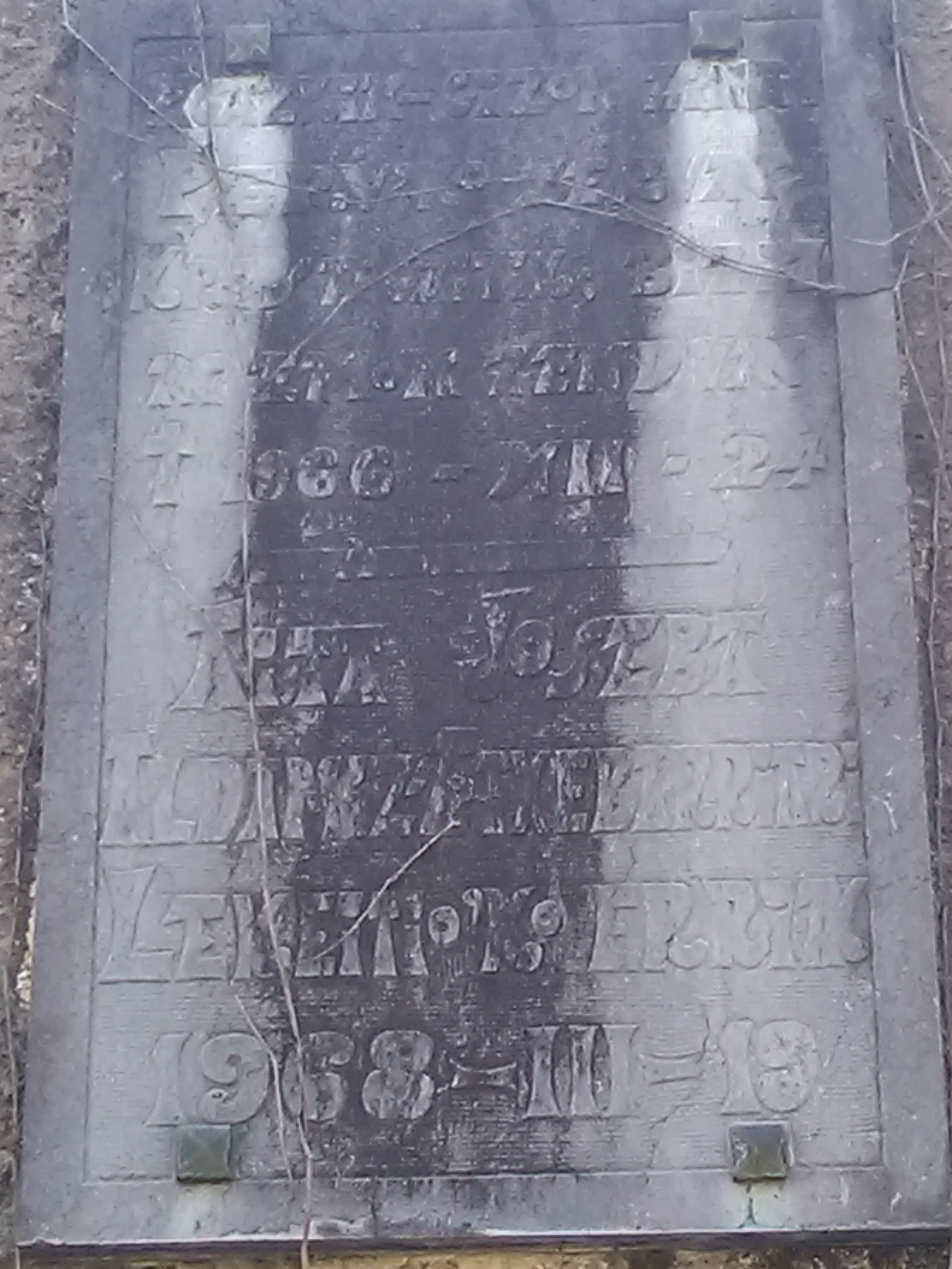 Lekeition, Joseba Aldamiz-Etxebarriaren izena daraman auzoan, bere omenezko monumentuaren plaka: "“Egazkin-gizon zinan/ Peruko zeruan/ Kristogaitik bizia / emon zenduan. 1966-XII-24. Aita Joseba Aldamiz-Etxebarriari Lekeitio'ko erriak. 1968-III-19".